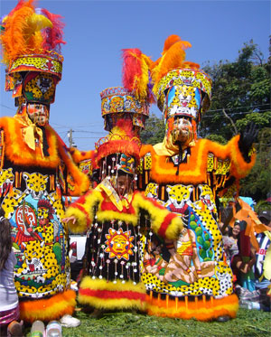 Chinelo de Tepoztlan